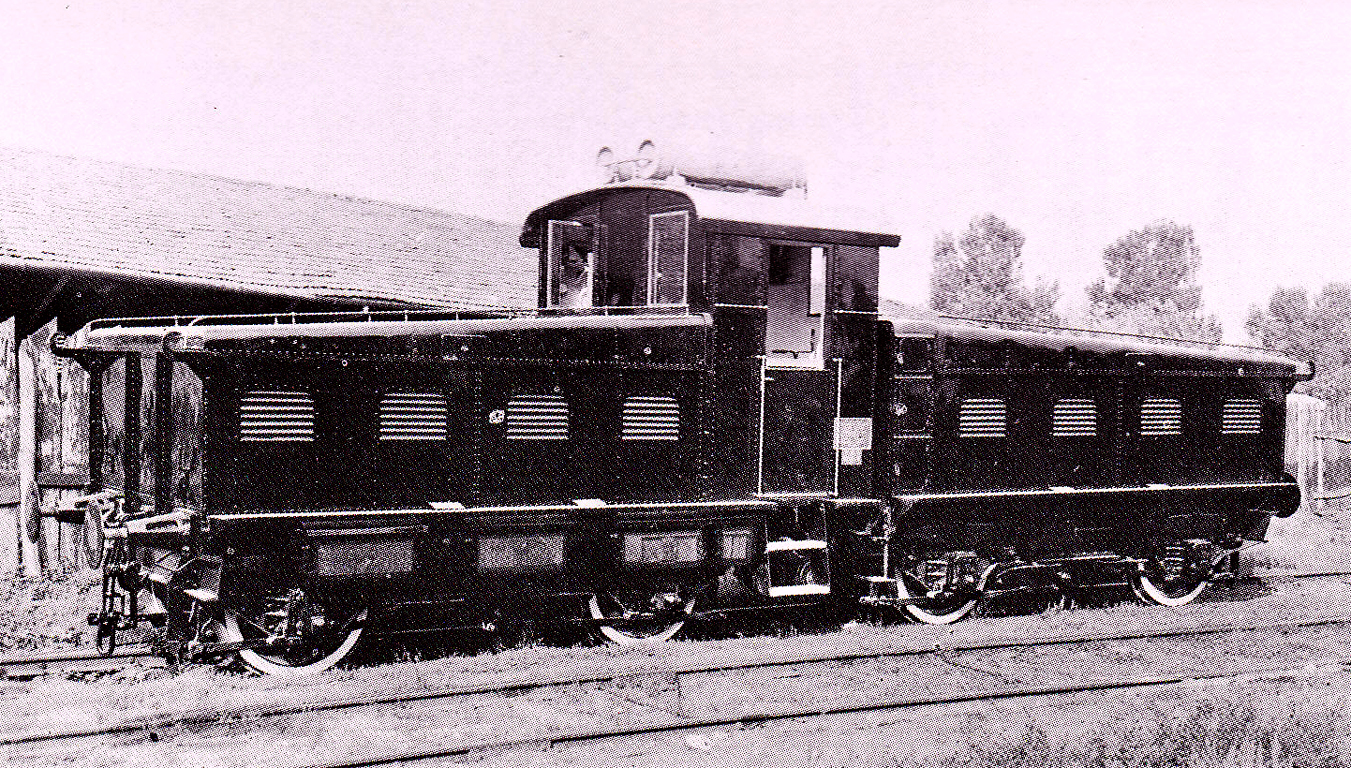 Foto di fabbrica della locomotiva ad accumulatori E.421.1 delle Ferrovie dello Stato.